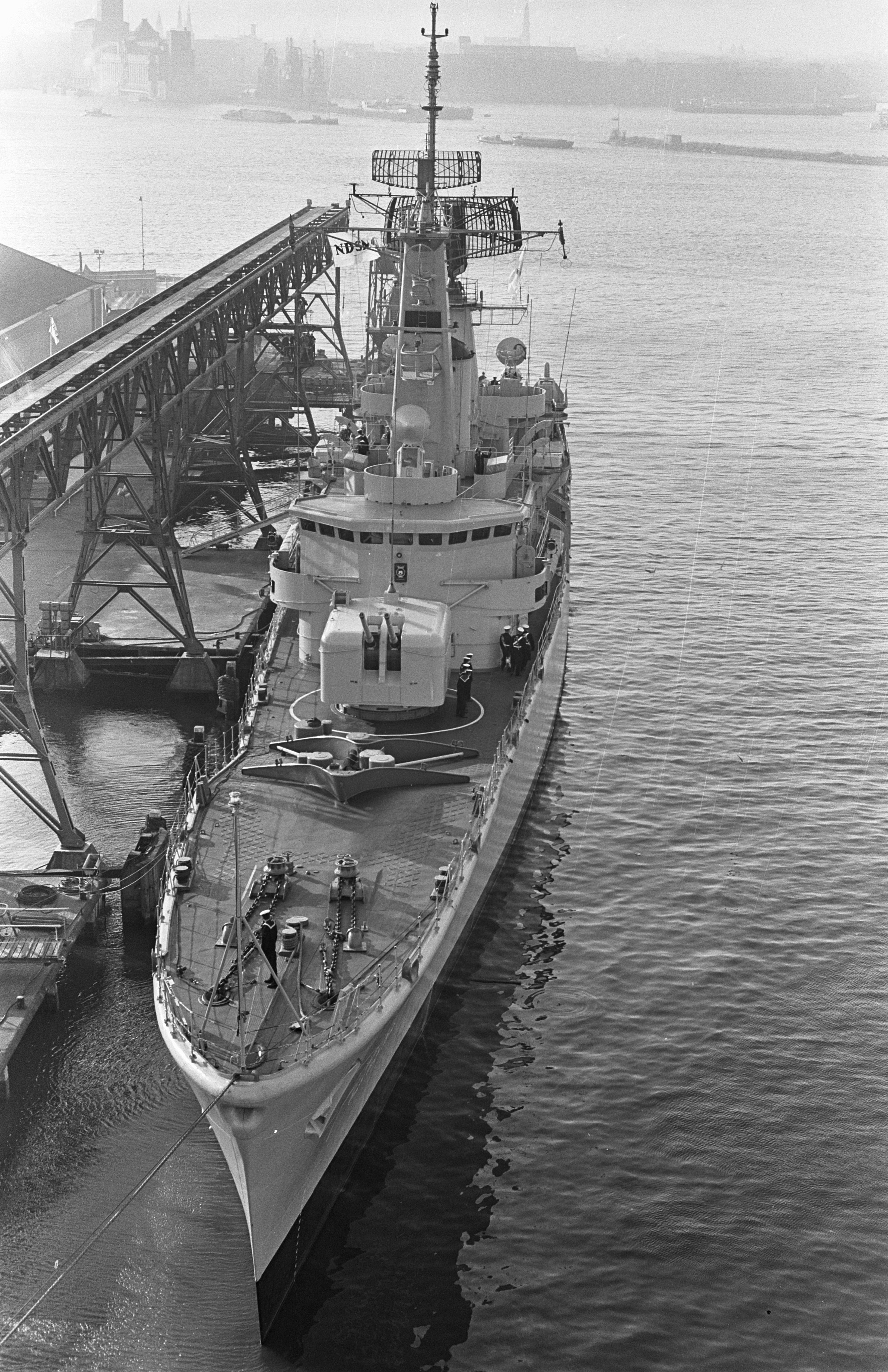 Collectie / Archief : Fotocollectie Anefo Reportage / Serie : [ onbekend ] Beschrijving : Onderzeebootbestrijdingsfregat Van Speijk op werf NDSM gebruik gesteld, het fregat Datum : 14 februari 1967 Locatie : Amsterdam Trefwoorden : scheepsbouw Instellingsnaam : HM Van Speyk Fotograaf : Kroon, Ron / Anefo Auteursrechthebbende : Nationaal Archief Materiaalsoort : Negatief (zwart/wit) Nummer archiefinventaris : bekijk toegang 2.24.01.05 Bestanddeelnummer : 920-0751